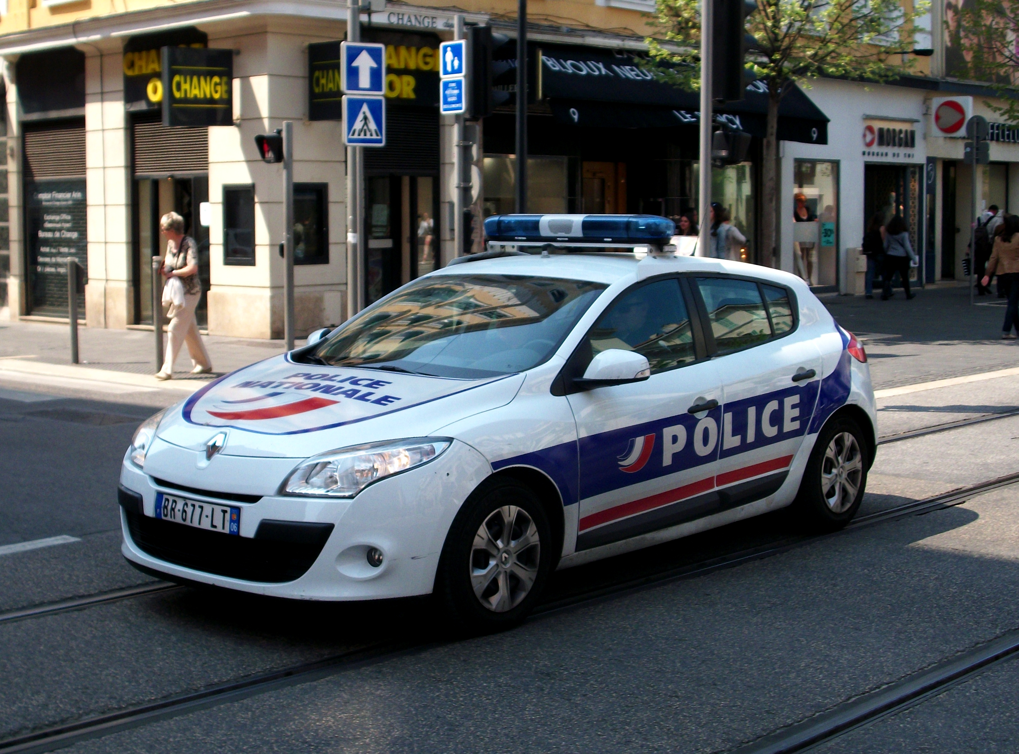 Renault Mégane III de la Police nationale à Nice